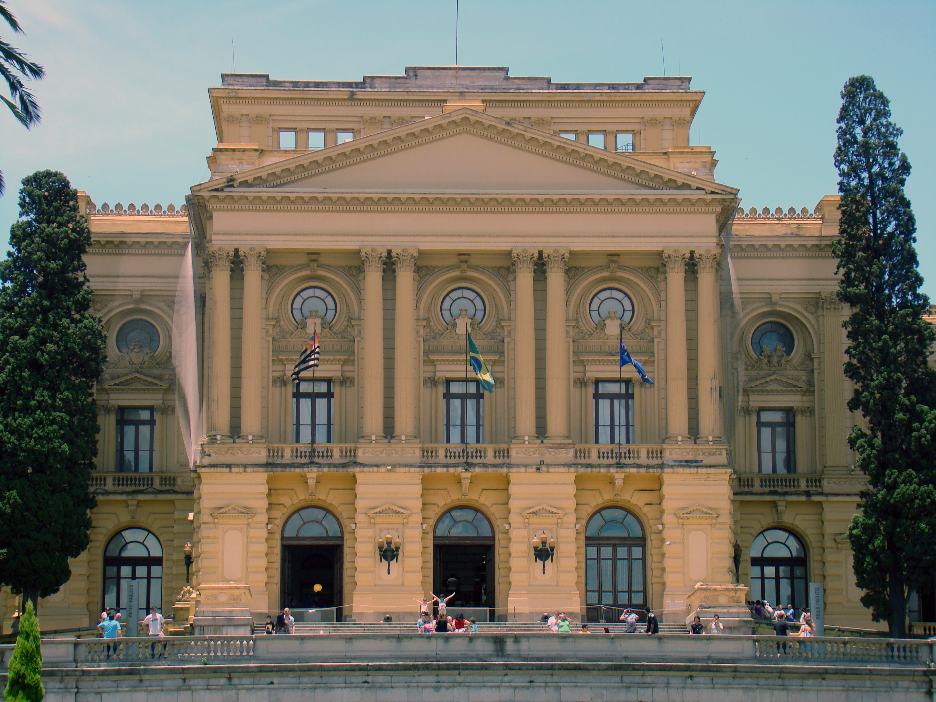 Museu do Ipiranga, São Paulo, Brasil.